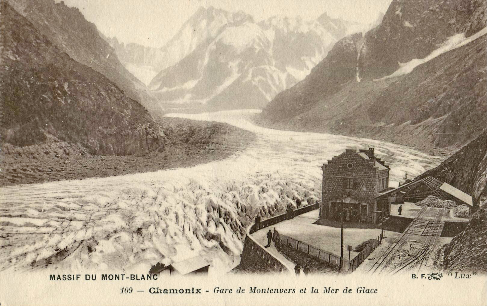 Carte postale ancienne éditée par BF à Paris, collection Lux - Massif du Mont-Blanc n°109 : CHAMONIX - Gare du Montenvers et la Mer de Glace